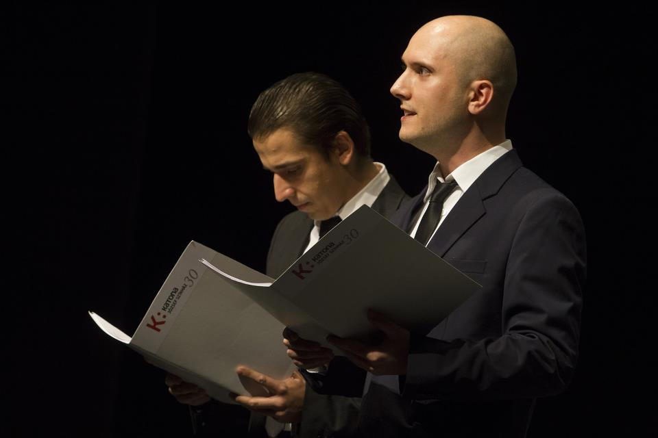 A Budapesti Katona József Színház, "Katona 30" című gálaesten készült felvétel. A műsort a színházzal azonos korú két művész, Kovács Lehel és Dankó István vezette.